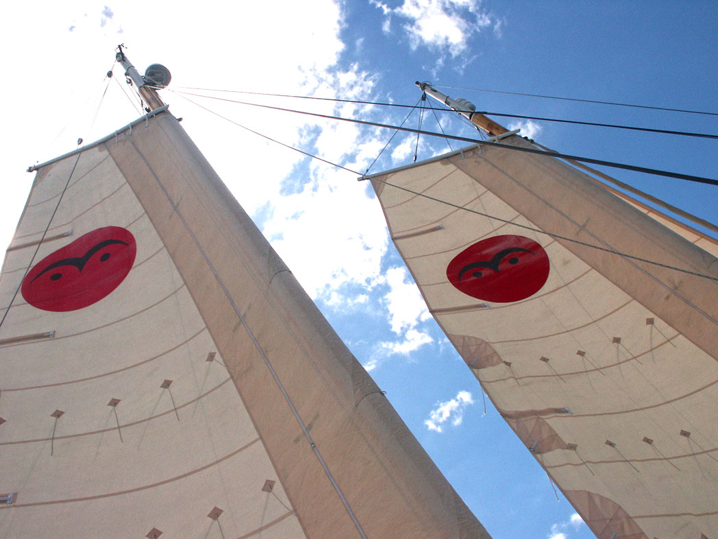 Pahi 63 Takelage, Eigenbau-Katamaran, James Wharram Design